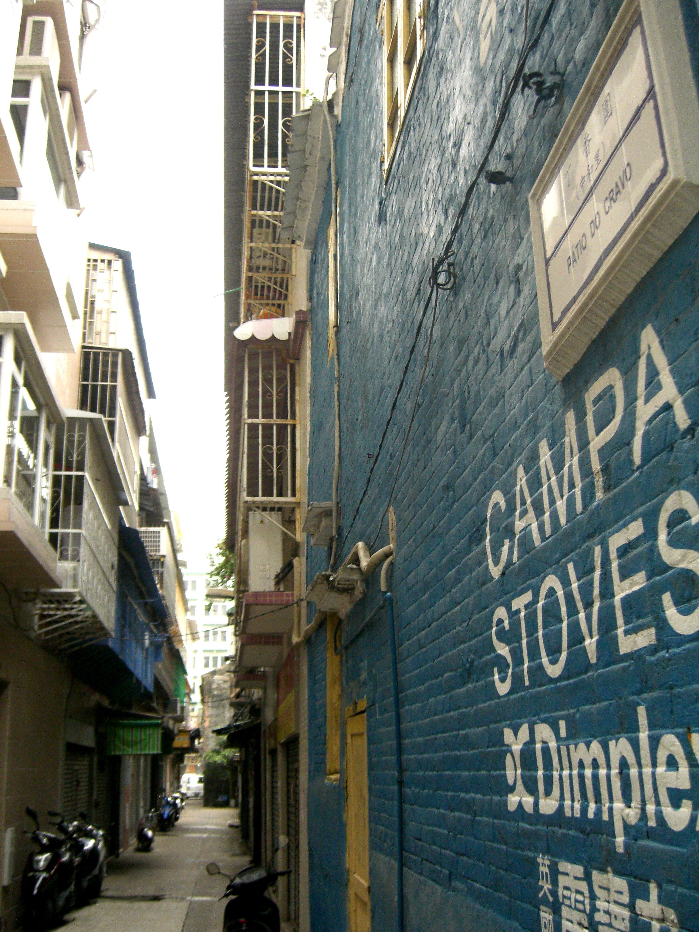 Pátio do Cravio